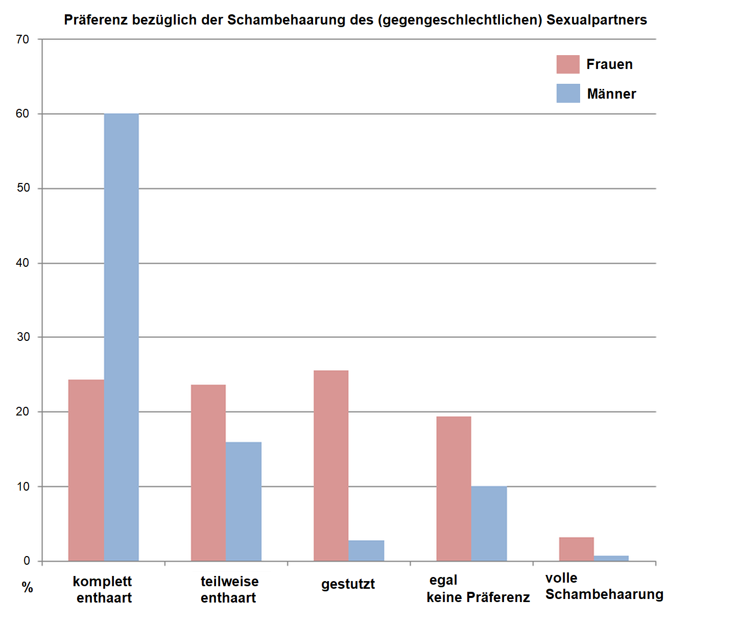 Daten basierend auf: Butler, S. M., Smith, N. K., Collazo, E., Caltabiano, L., & Herbenick, D. (2014). Pubic Hair Preferences, Reasons for Removal, and Associated Genital Symptoms: Comparisons Between Men and Women. The journal of sexual medicine.